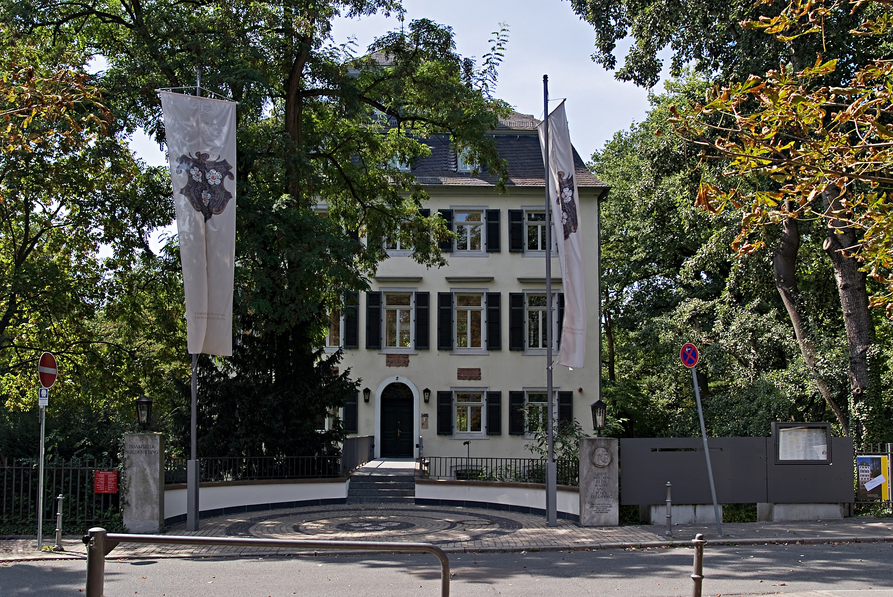 Vorderseite des Holzhausenschlösschens